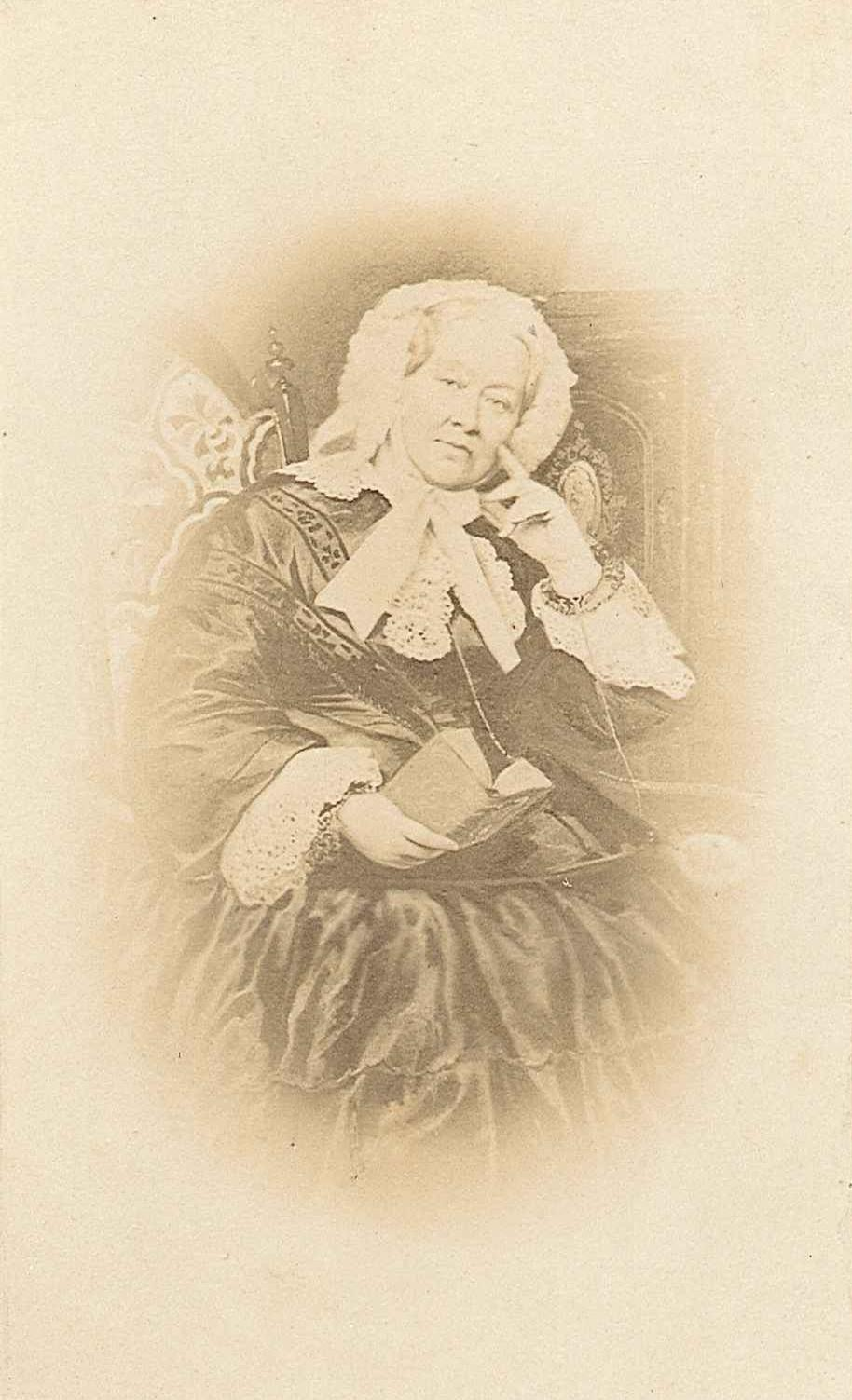 Herzogin Henriette von Württemberg, geborene Prinzessin von Nassau-Weilburg (1780–1857). Fotografie, 19. Jahrhundert